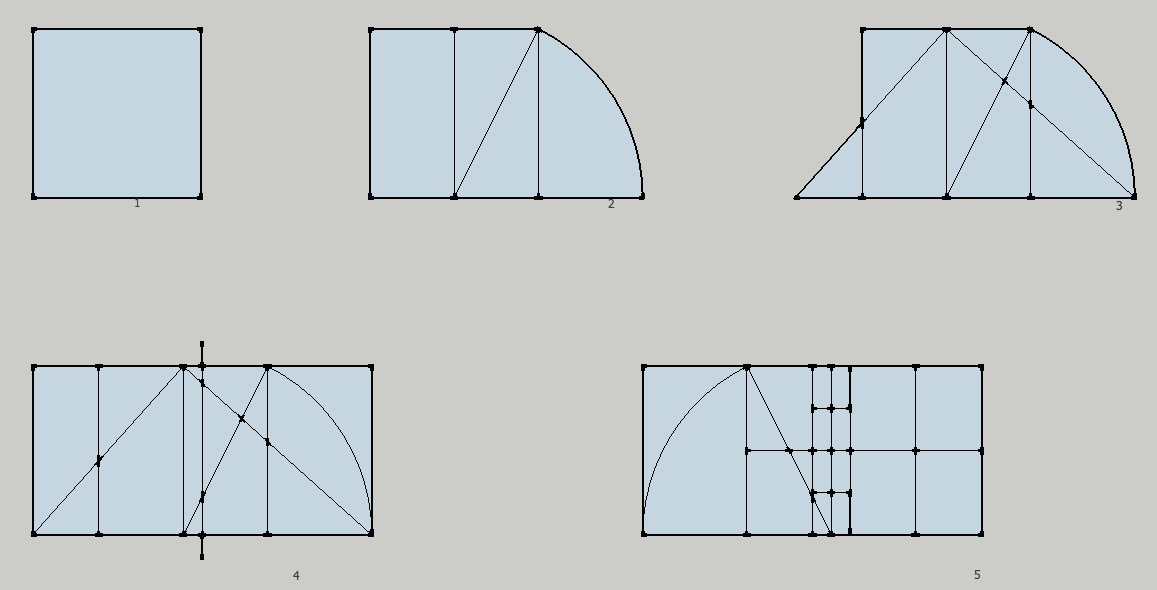 Le processus de construction du Modulor proposé par Maillard.